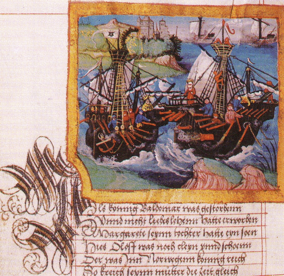 Landesbibliothek Mecklenburg-Vorpommern, Ms. 376, folio 94. Seekrieg zwischen König Albrecht III von Schweden und Königin Margareta von Dänemark. Text: Als konnig Baldomar was gestorbenn Vnnd nicht liebeslehinn hatte erworben Margarete seynn tochter hatte eyn soen Hies Oloff was noch cleyn vnnd schoenn Der was Inn Norwegenn konnig reich So kreich seynn mutter die zeit gleich ... cf. (LXXII.)